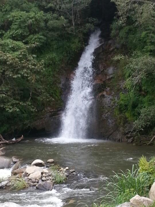 Catarata junto a un restaurante en Santa María de Dota